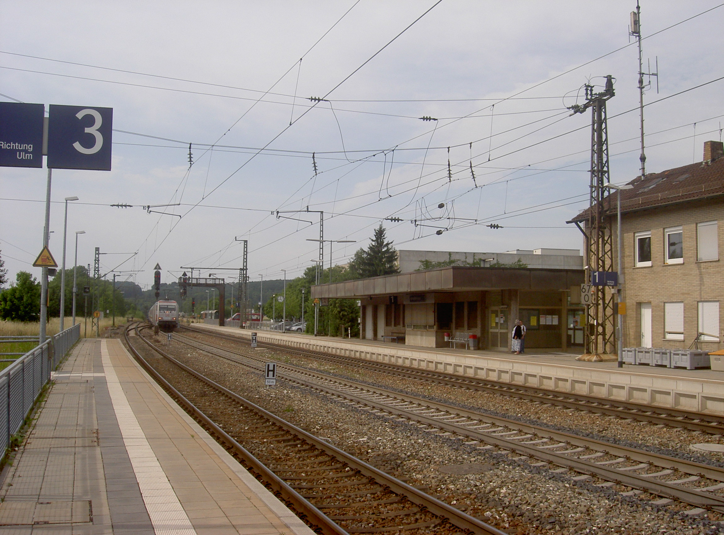 Intercity von Frankfurt nach Salzburg fährt durch den Bahnhof Amstetten (Württ).